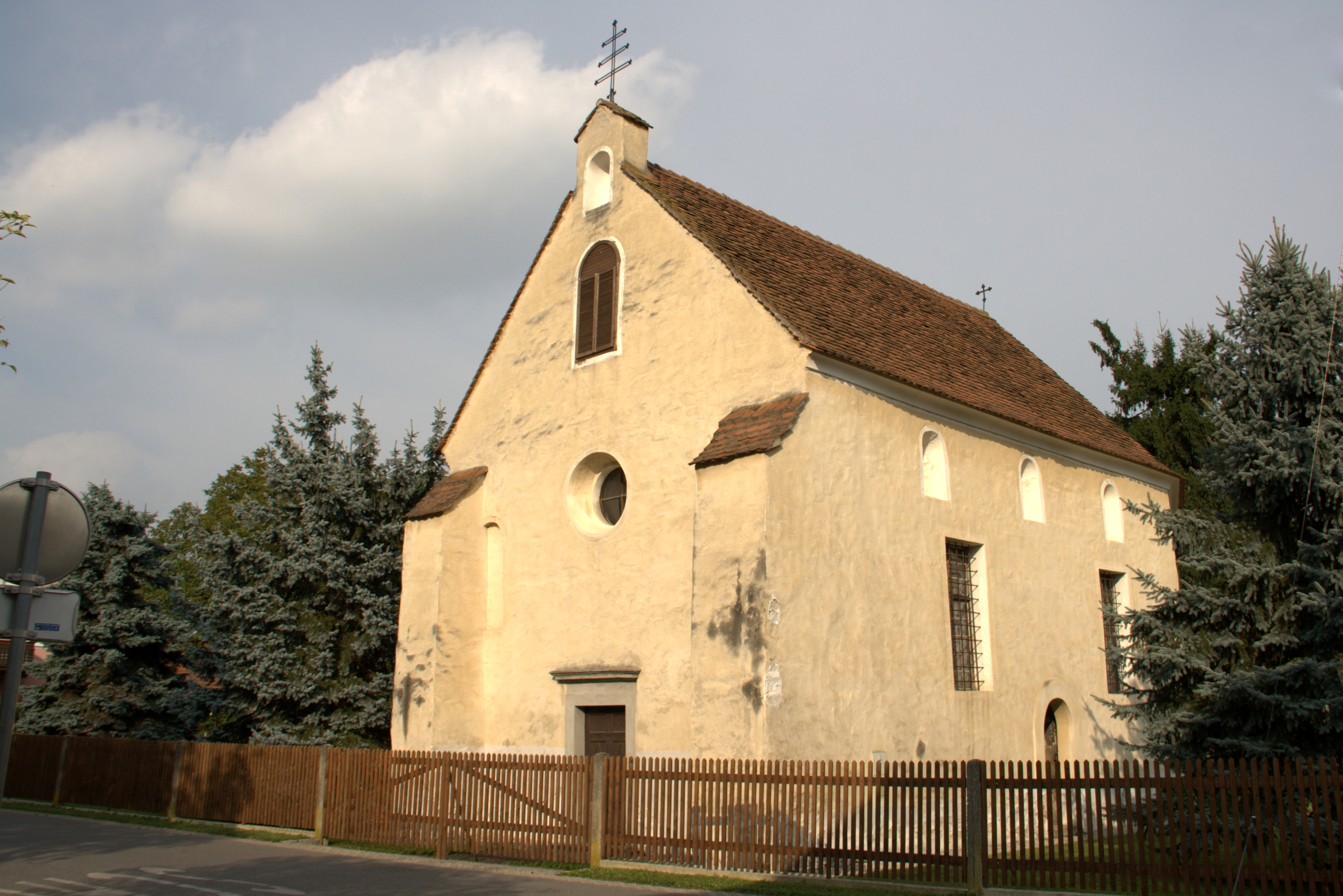 Kath. Pfarrkirche hl. Rupert, Aribonenkirche, Straßgang, Graz